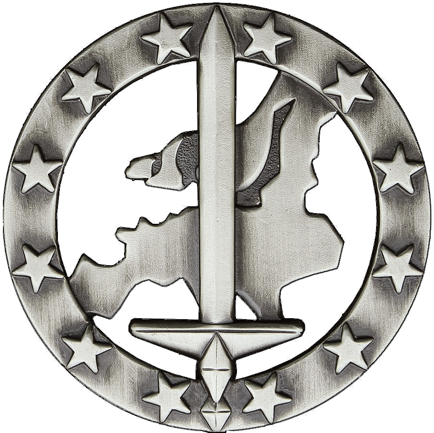 Barettabzeichen des Eurokorps der Bundeswehr Barettfarbe: Marineblau Maße: Durchmesser: 50 mm Ausführung: altsilber, Metall